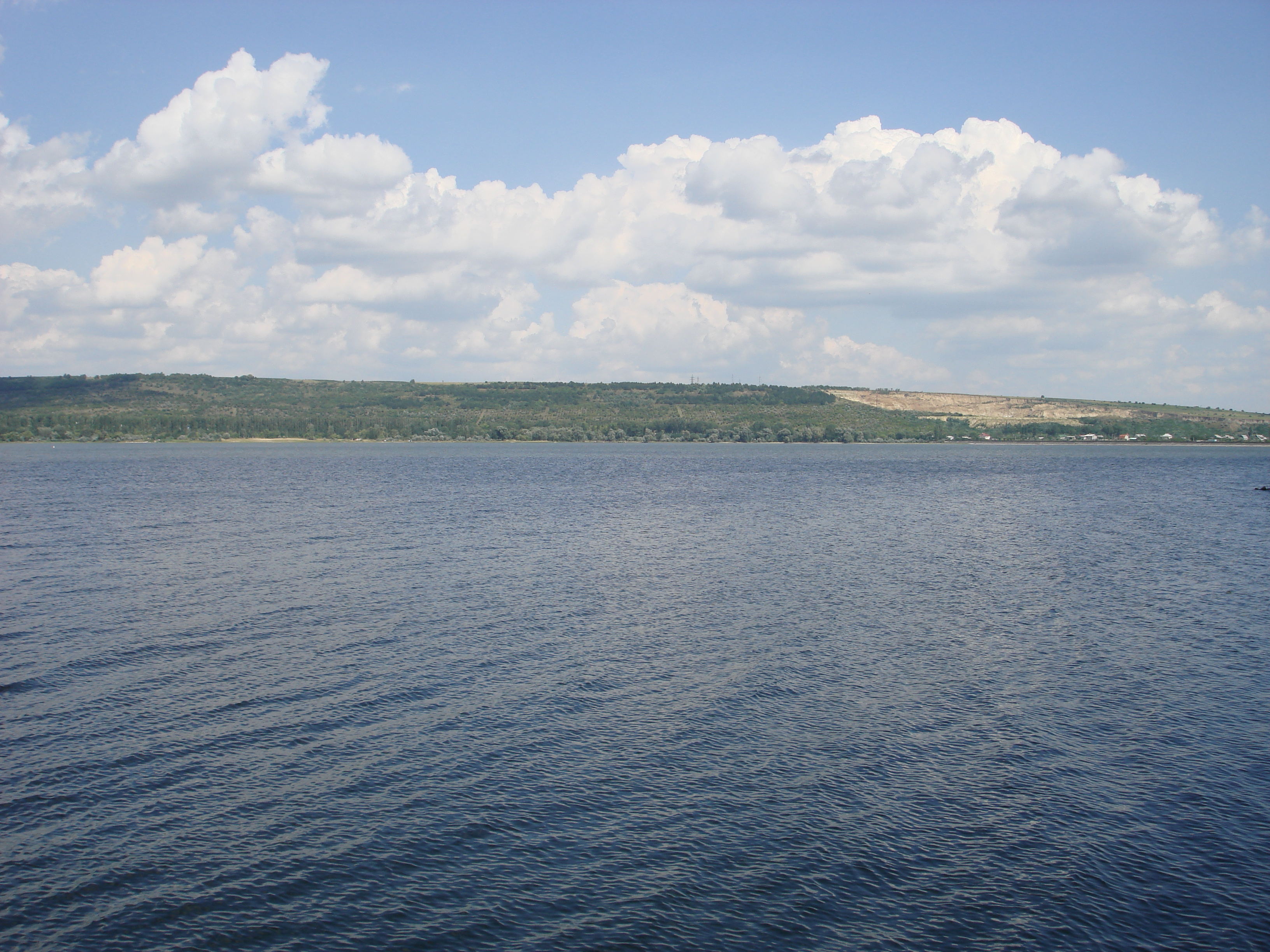 Гидигичское водохранилище